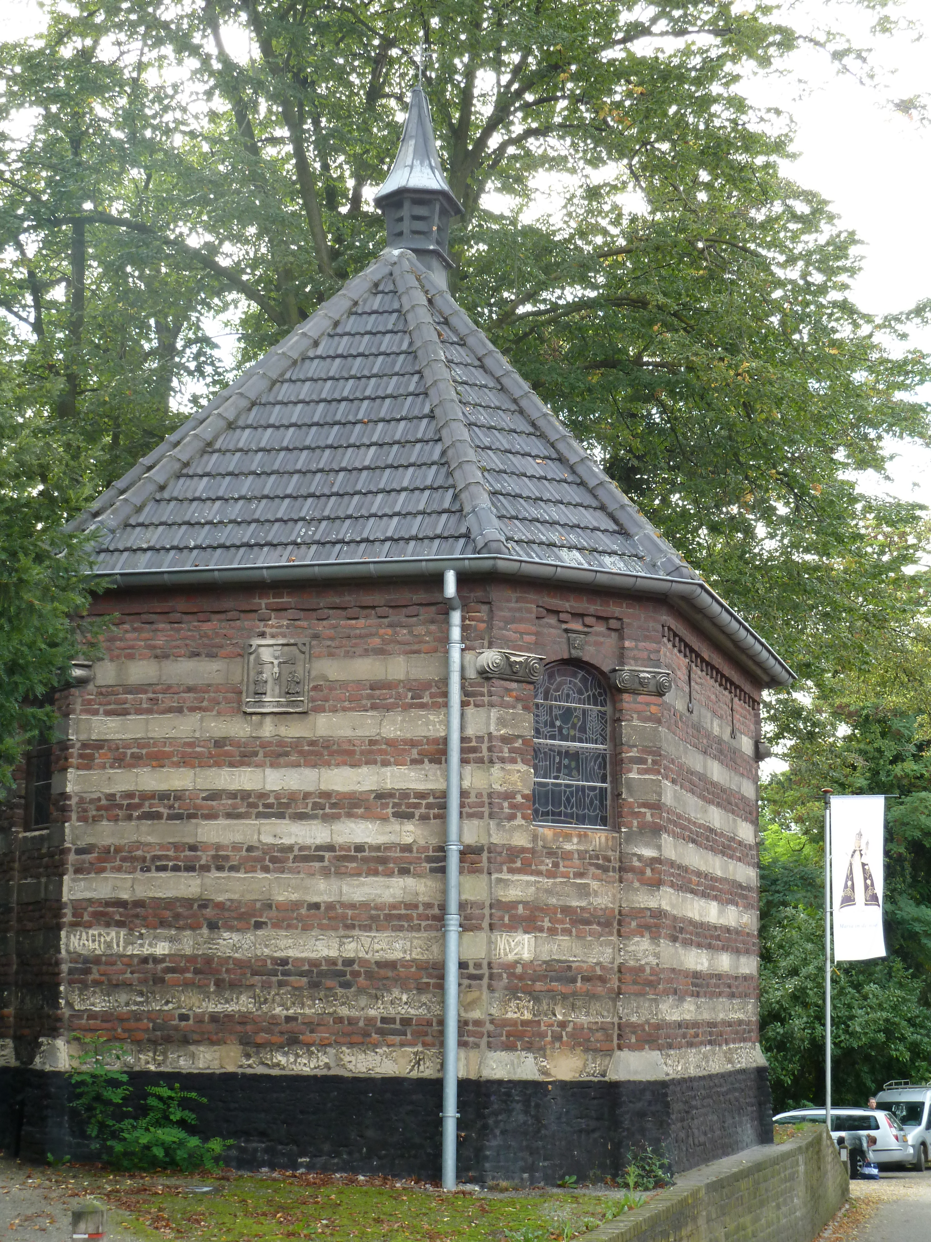 Mariakapel aan de Kapelbergweg, Stein, Limburg, Nederland